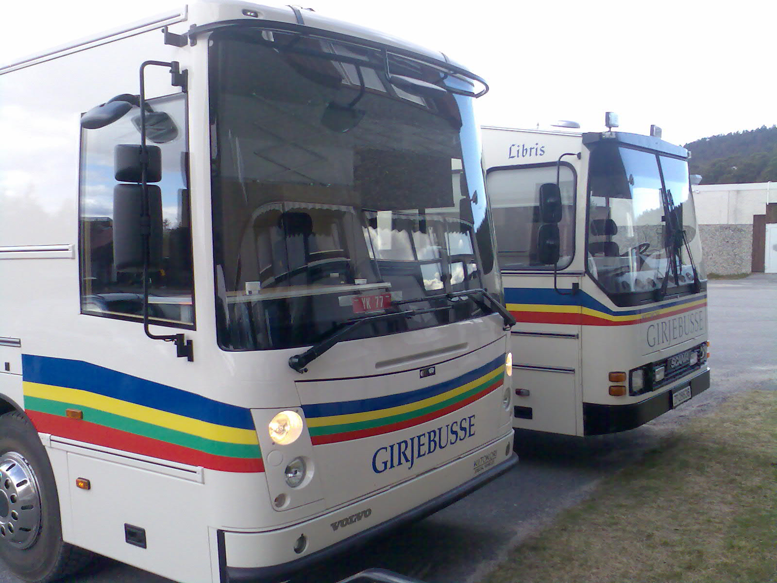 Ny og gammel bokbuss mellom Karasjok, Porsanger og Utsjok. De samiske bokbussene er en viktig del av bibliotektilbudet til samene. Foto: Kåre Balto / Sametinget.